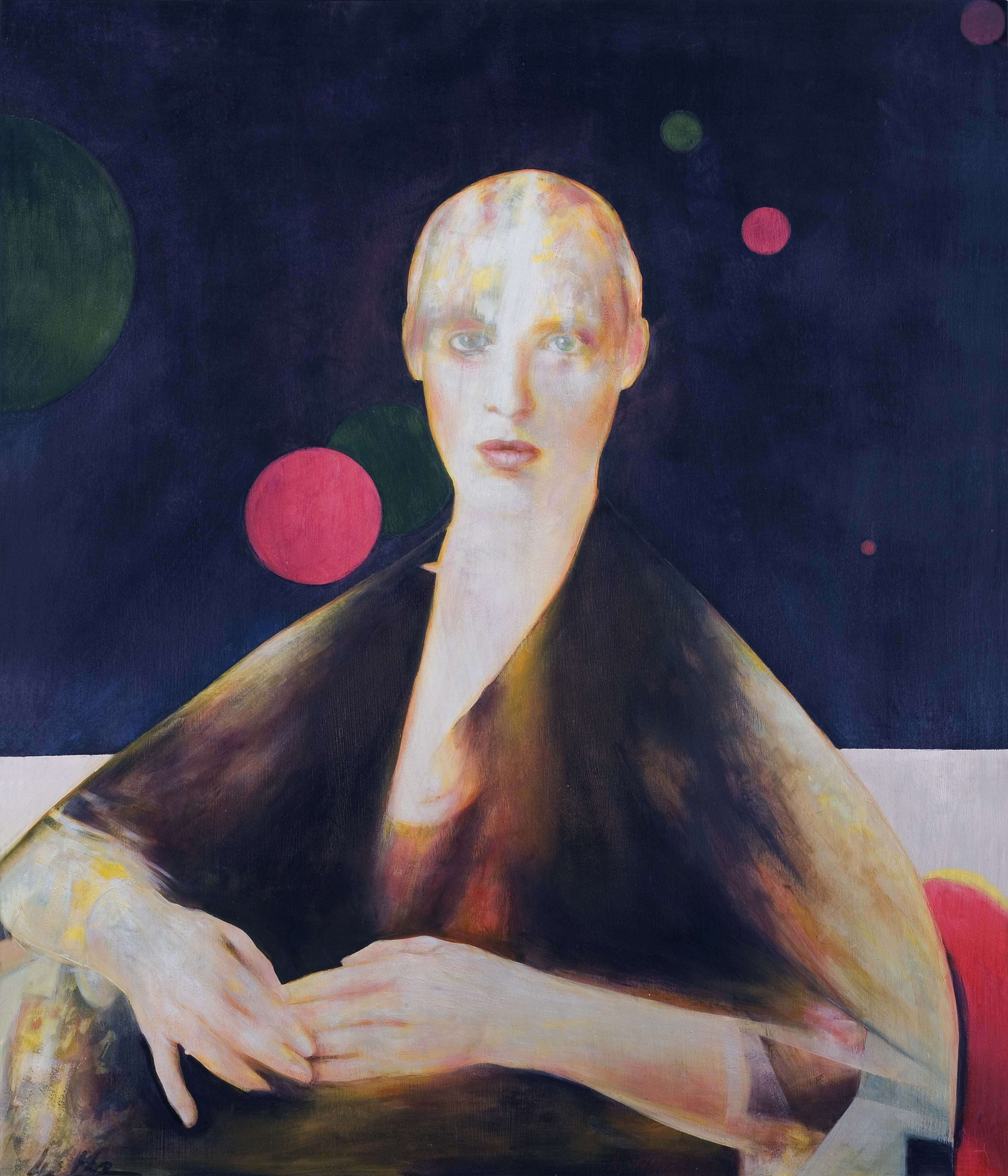 Ritratto di donna, olio su tavola, cm 86 x 73. Opera distrutta nell'incendio del 25 aprile 2019